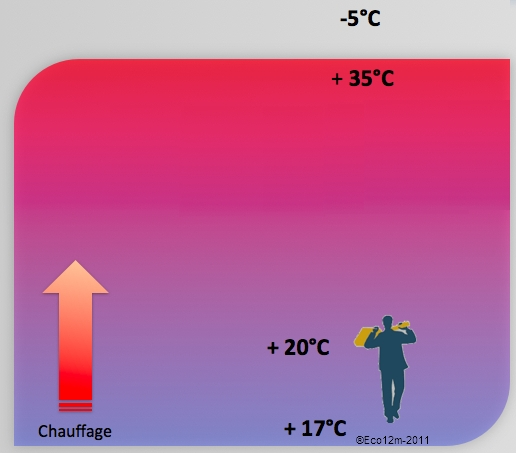 Stratification en températures d'un local chauffé